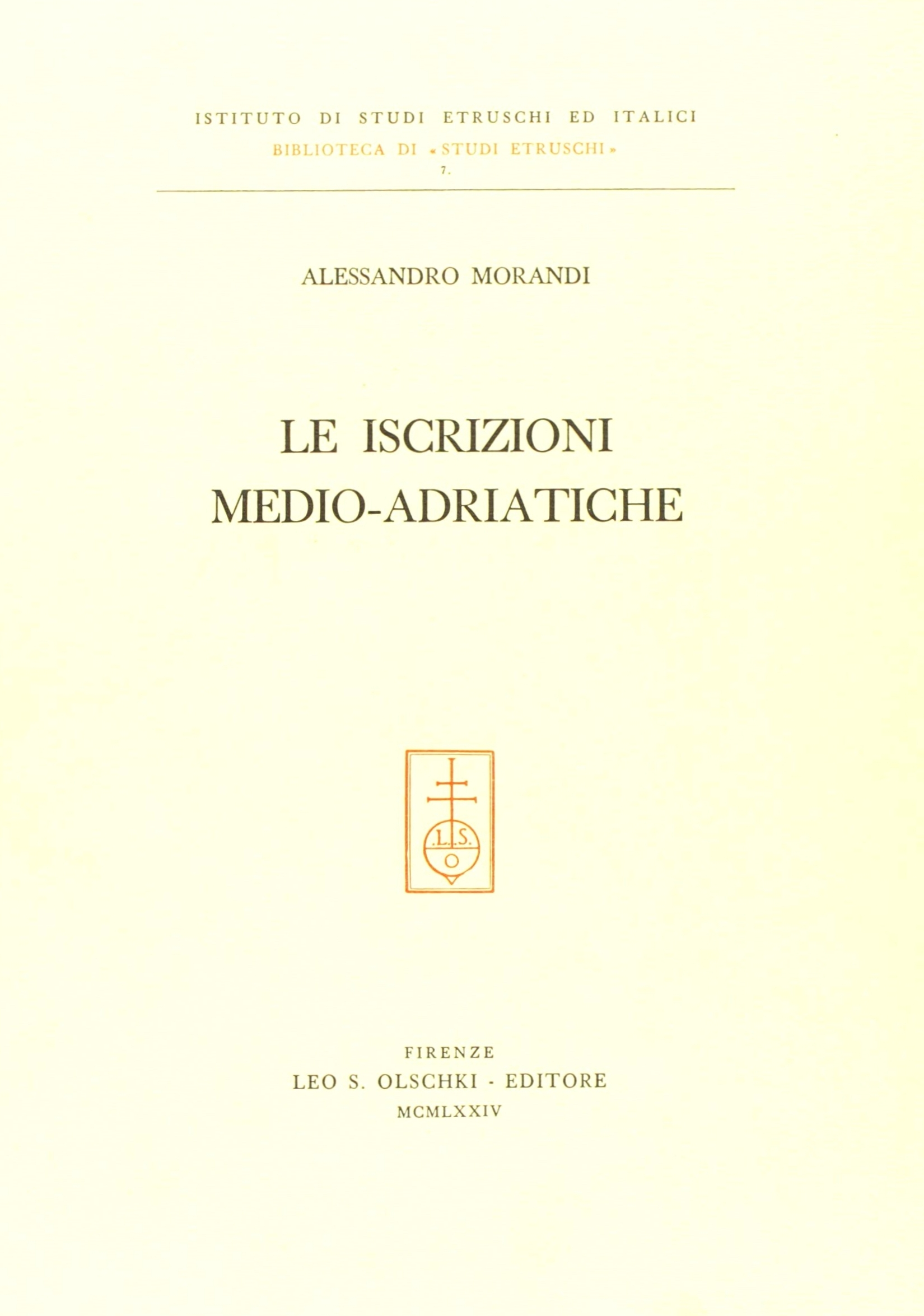 Alessandro Morandi: Le iscrizioni medio-adriatiche. Olschki, Firenze 1974.